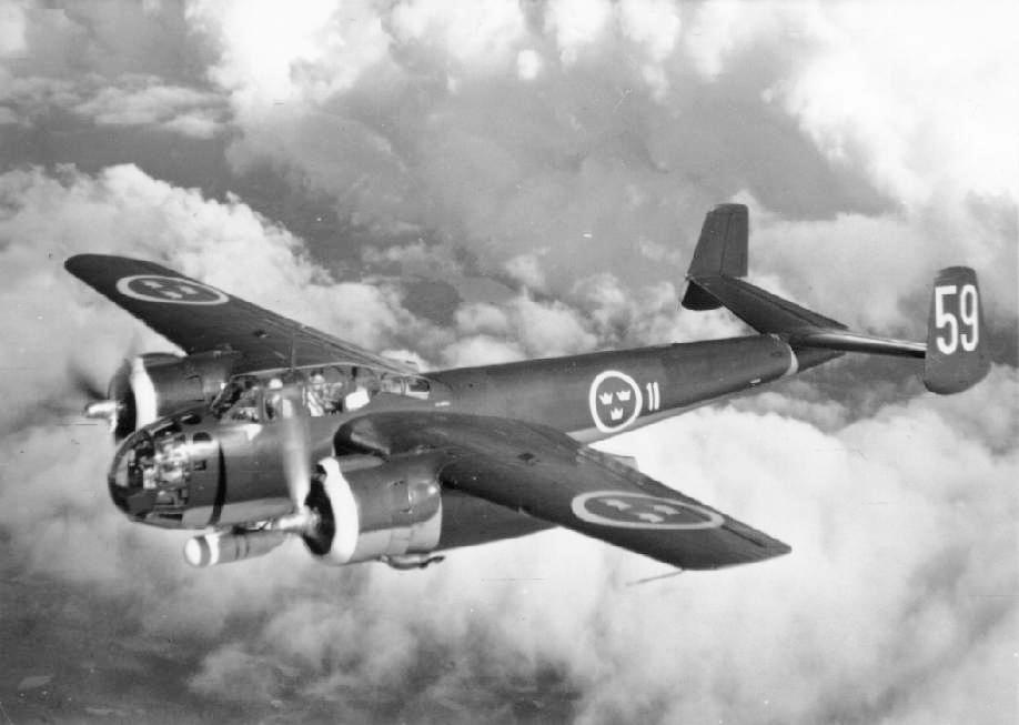 Saab S 18